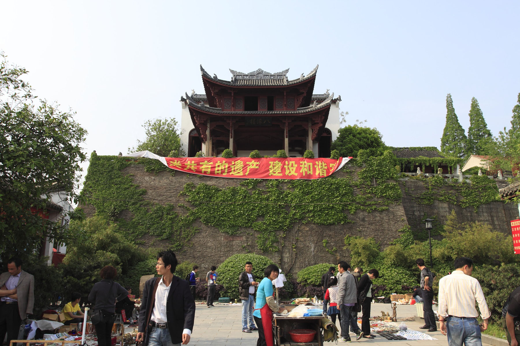 浙江金华八咏楼，浙江省文物保护单位